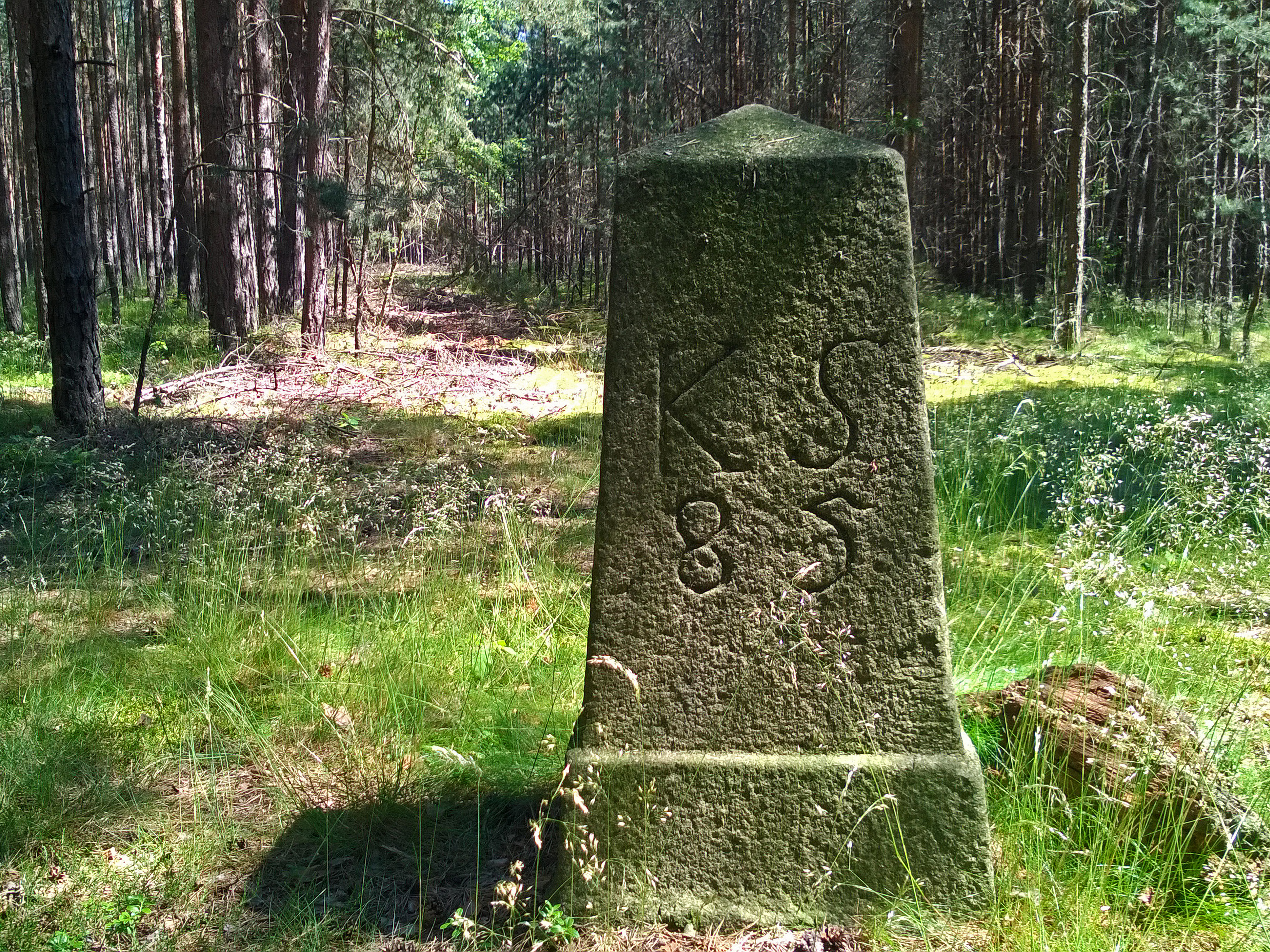 Grenzstein 85 Historische Landesgrenze Königreich Sachsen Königreich Preußen 1815 (Wiener Kongress) Hornjoserbsce: Historiski saksko-pruski měznik čo. 85 w holi pola Noweje Wsy